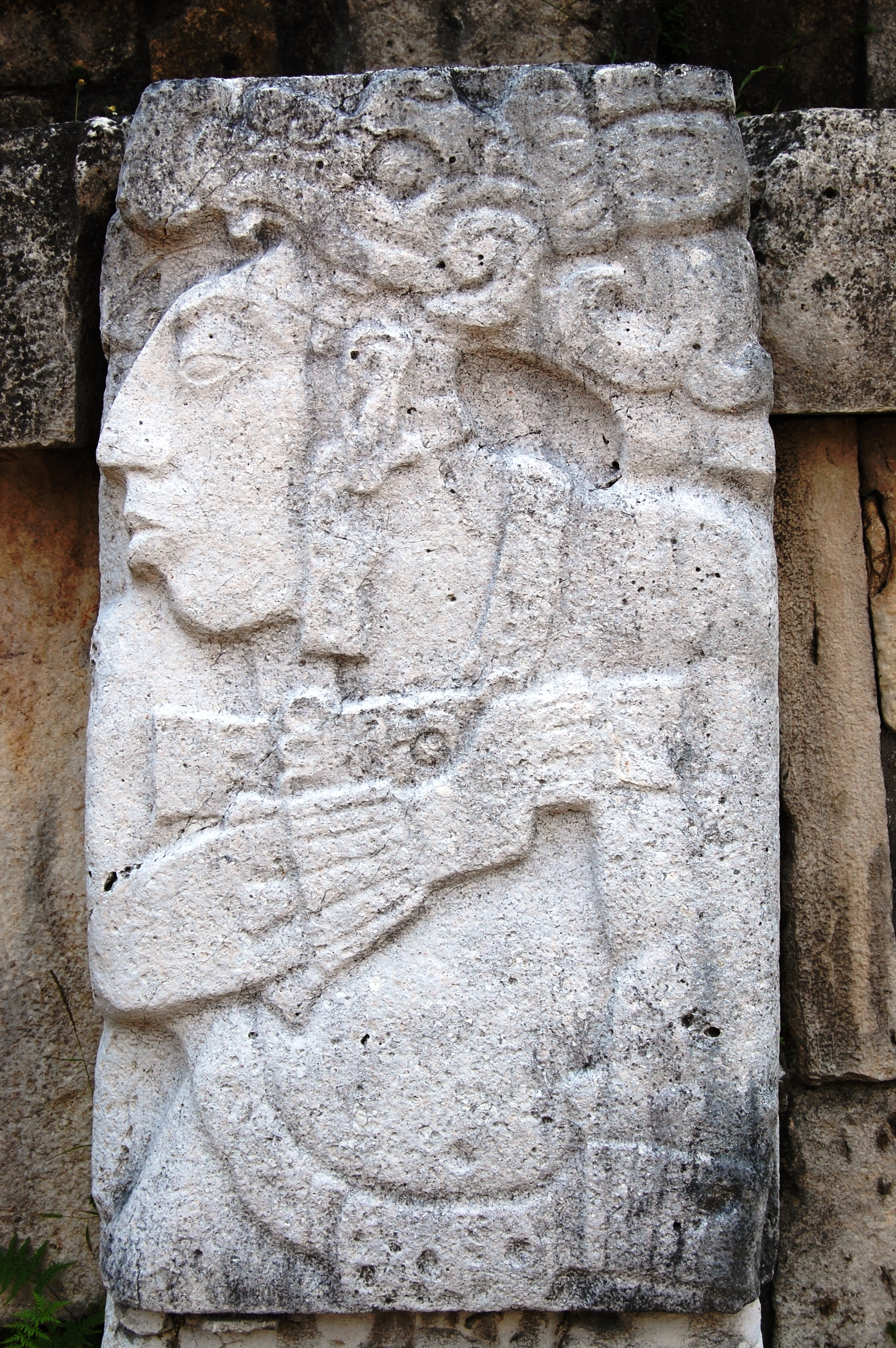 Palenque, Mexico El Palacio, detail